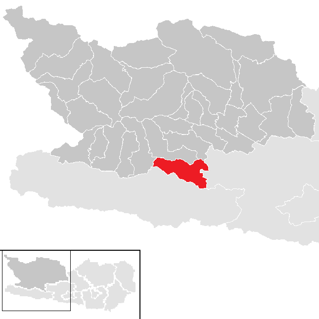 Karte der Gemeinde Weissensee im Bezirk Spittal an der Drau